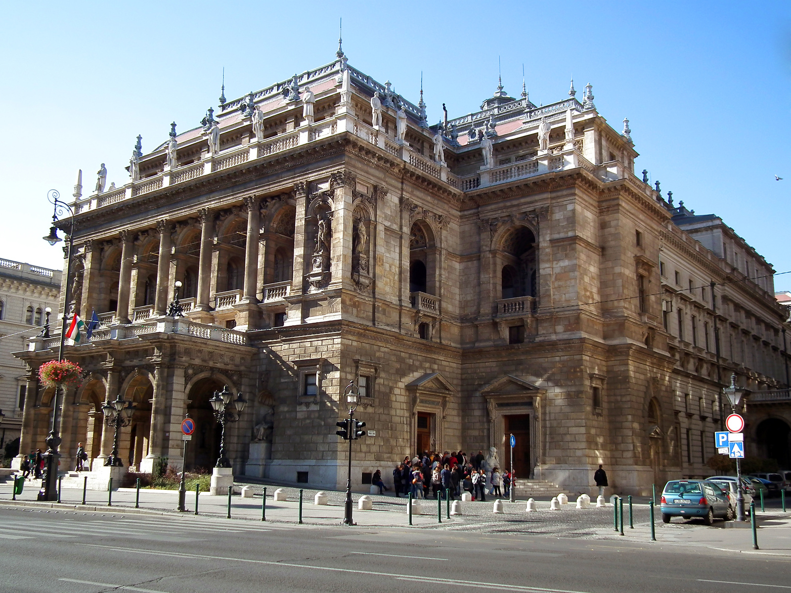 Operaház (Budapest 6, Andrássy út 22., Dalszínház utca 3-9., Hajós utca 4-10., Lázár utca 19.) This is a photo of a monument in Hungary, Identifier: 695